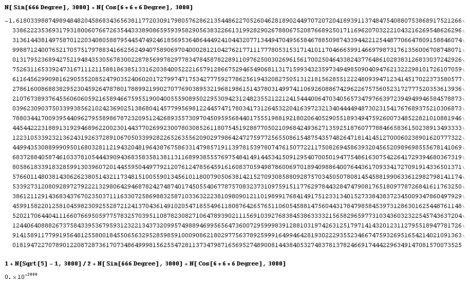 la sezione aurea calcolata nelle sue prime 3000 cifre significative con Mathematica versione 7.0.0. Partendo da una particolare equazione che la lega alla sezione aurea e dimostrata nel 1994: neg(phi)=sin(666°)+cos(6x6x6°)le è stata aggiunta questa seconda nota relazione: 1+[sqrt(5)]-1]/2 ottenendo lo zero nell'approssimazione delle prime 3000 cifre.